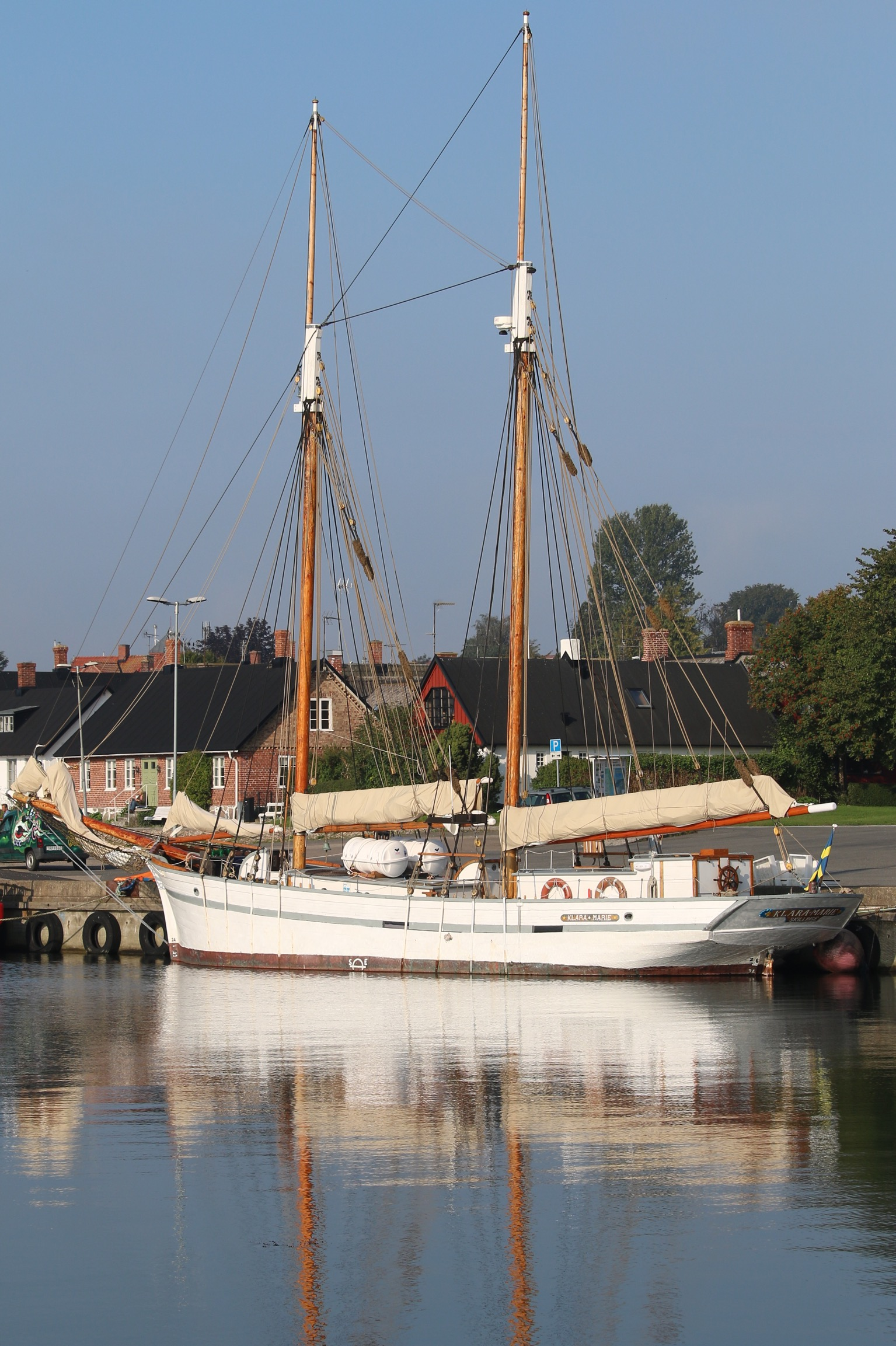 Klara Marie (1884) This is an image of a protected Swedish ship, with call sign SDQV .